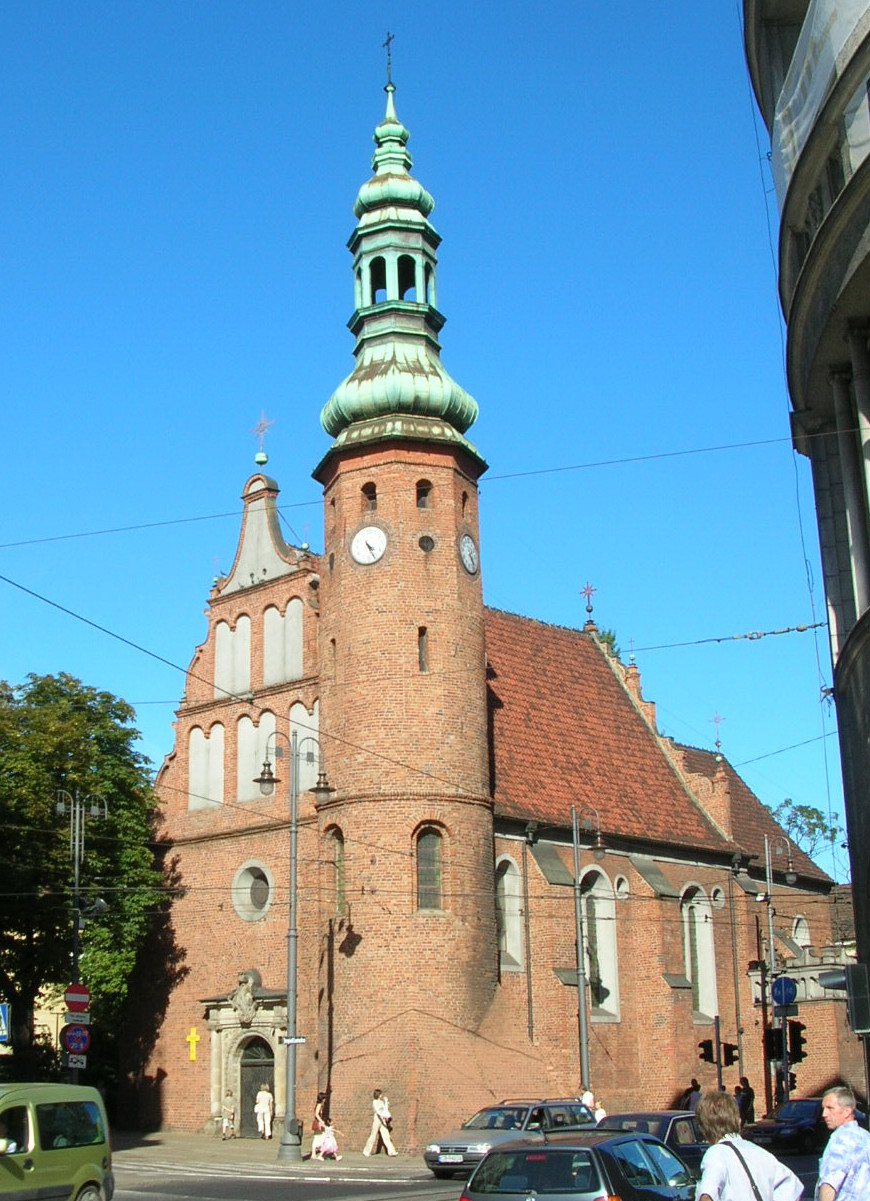 Bydgoszcz, ul. Gdańska - dawny kościół klasztorny klarysek, ob. parafialny p.w. MB Wniebowziętej, 1582/1615 r.